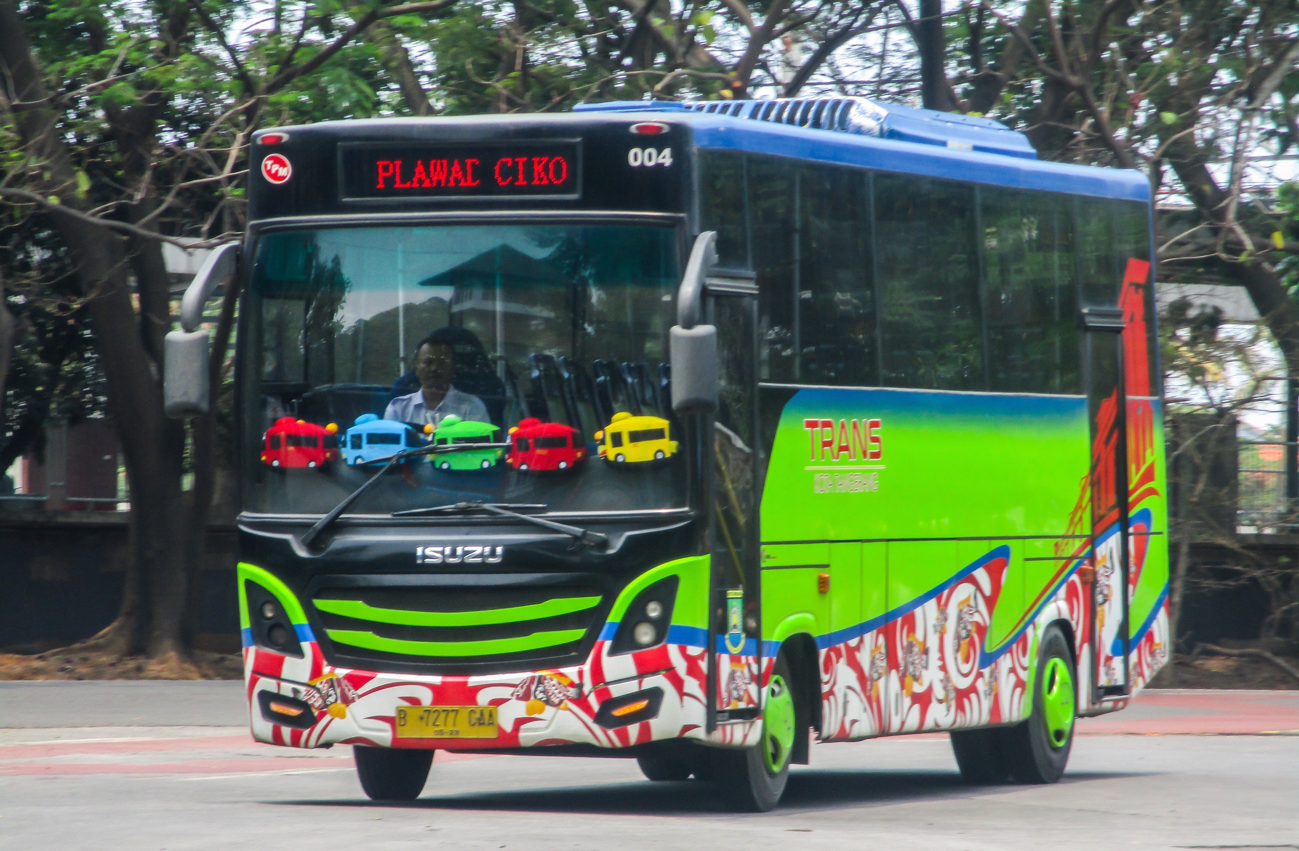 Armada koridor 2 memasuki Terminal Poris Plawad